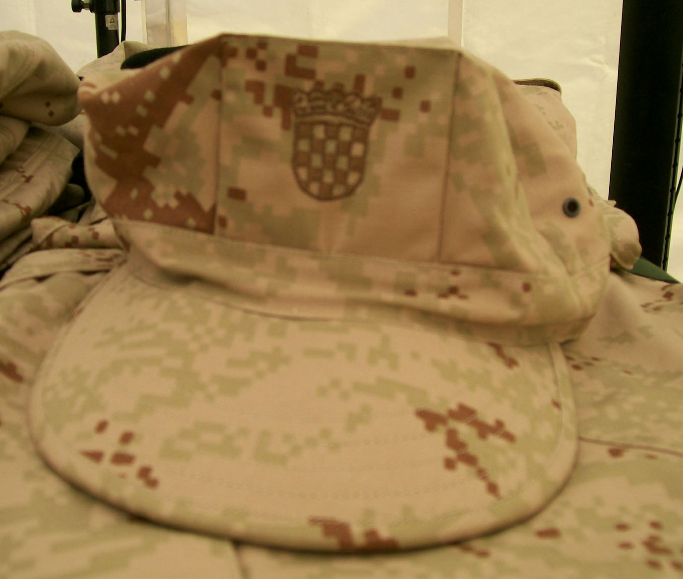 Kapa vojna HV pustinjska